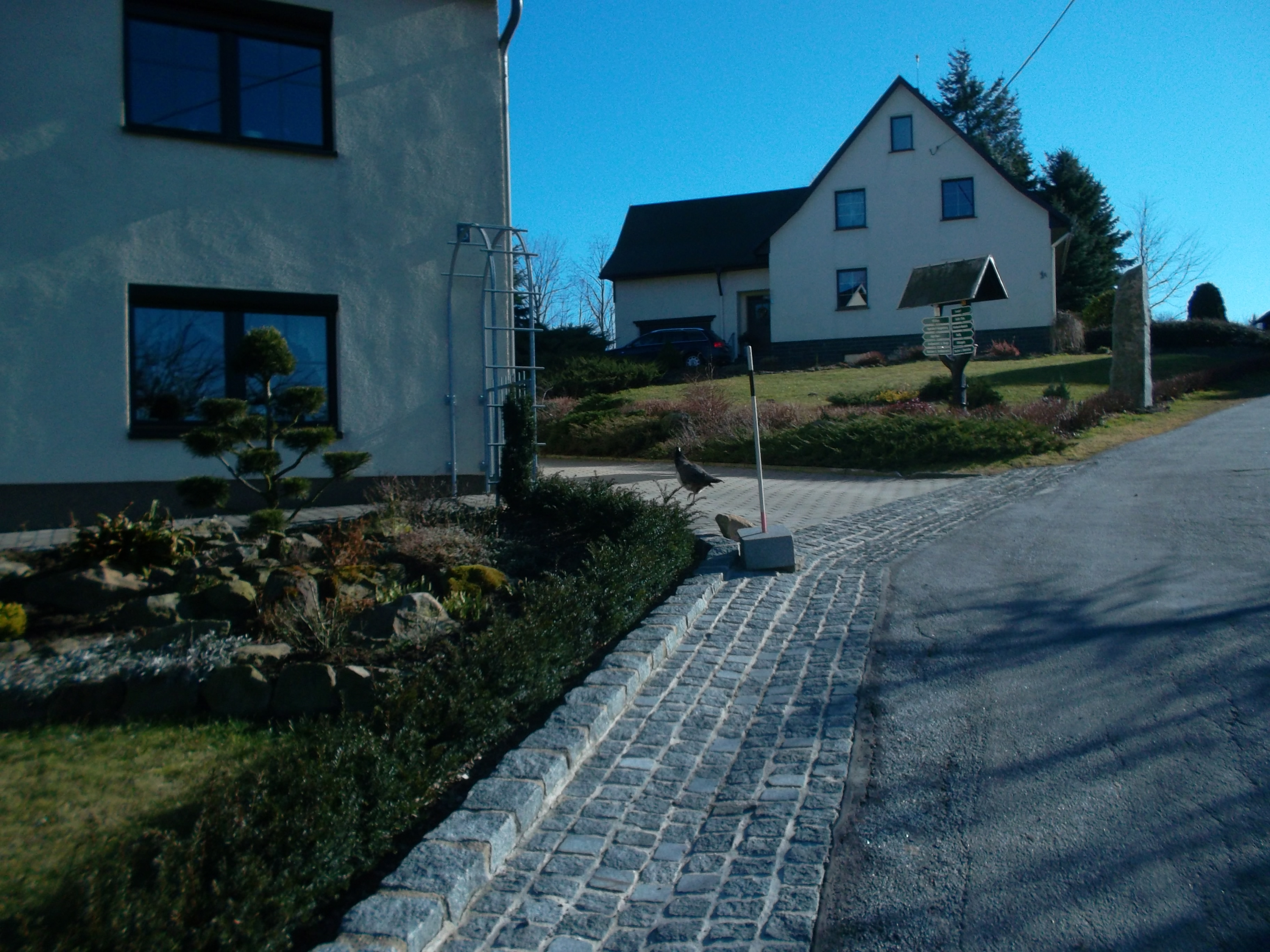 ein Pfau in der Dorfmitte von Sora